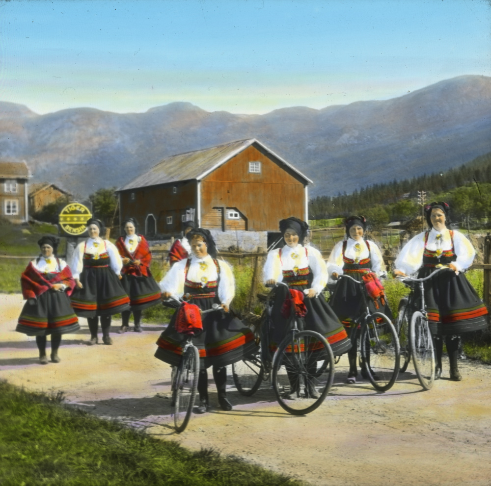 Håndkolorert dias. 8 kvinner i Setesdalsdrakter på vei til kirken. 4 av kvinnene er på sykkel. I bakgrunnen ser man bygninger og fjell.